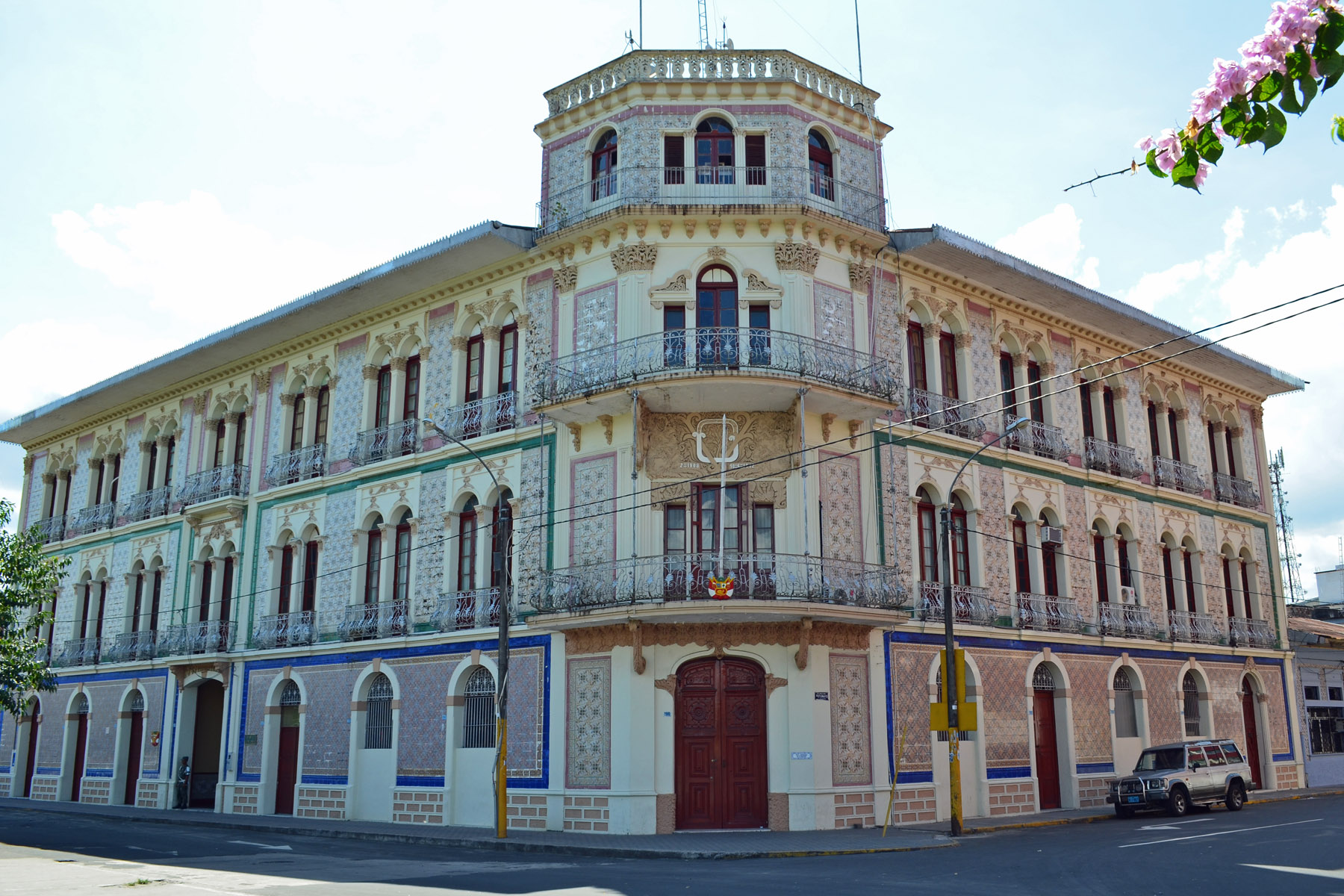 Ex-Hotel Palace